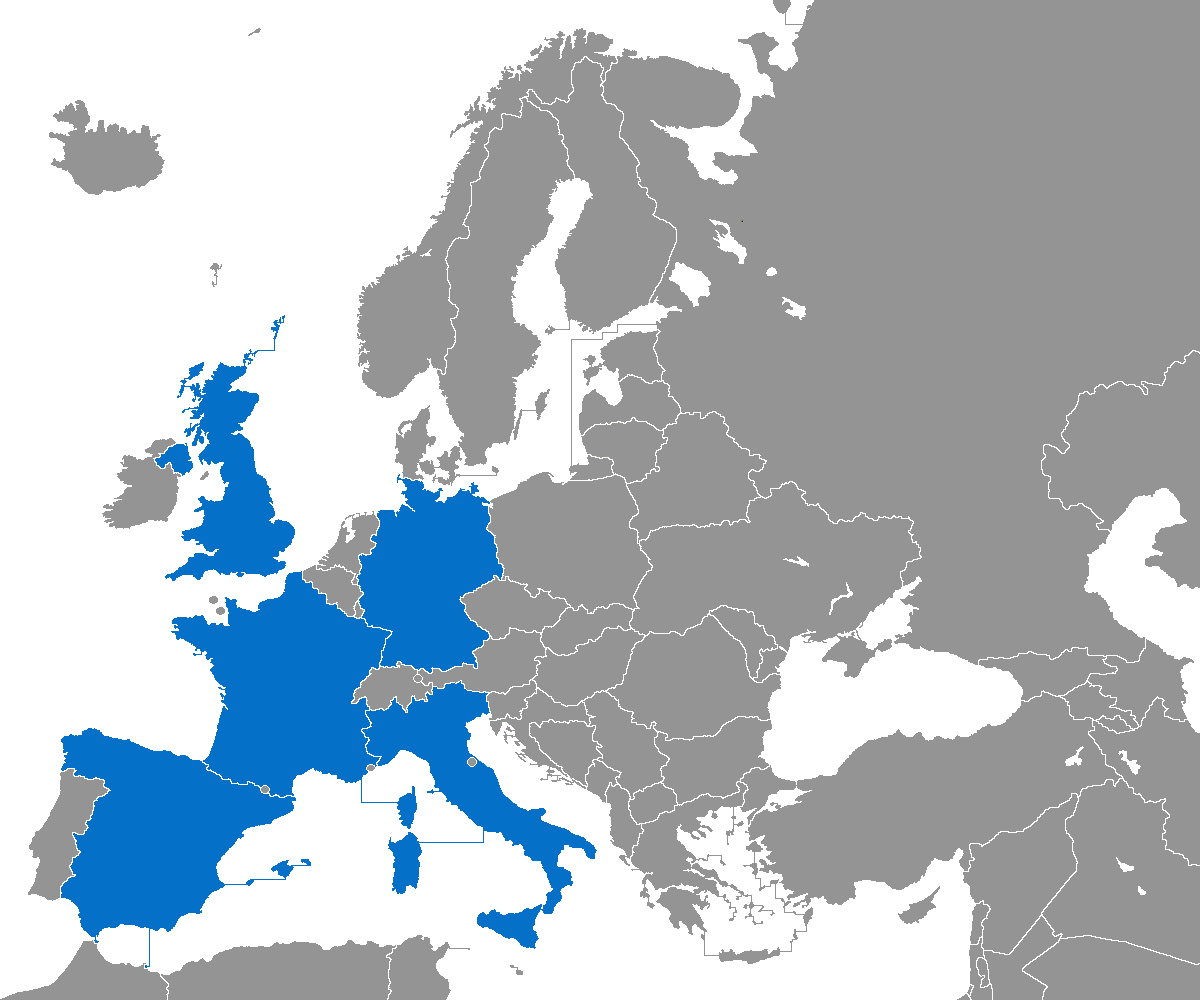 Big 5 eurovisiónː Alemania, Francia, España, Italia y Reino Unido.